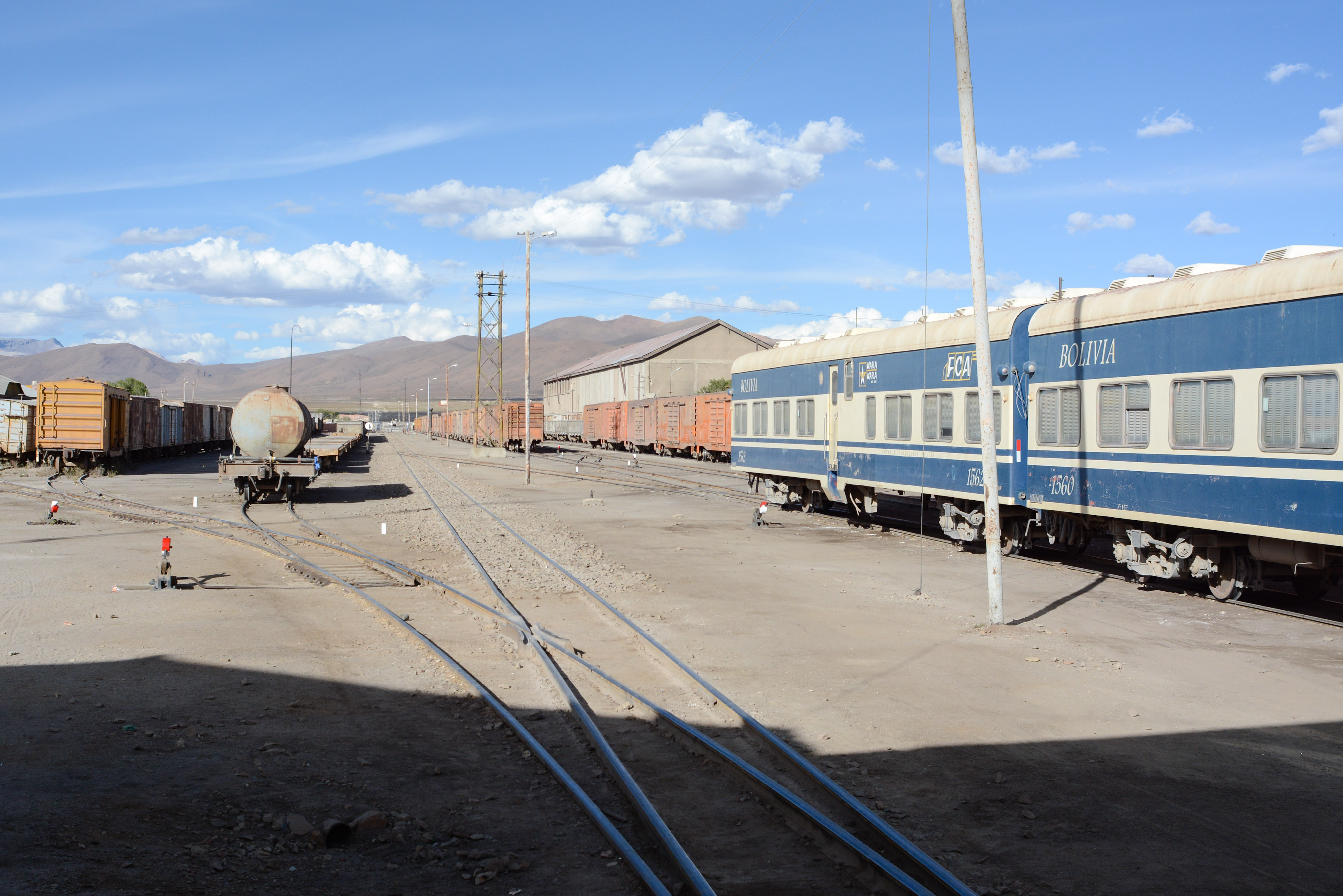 Uyuni, Bolivien